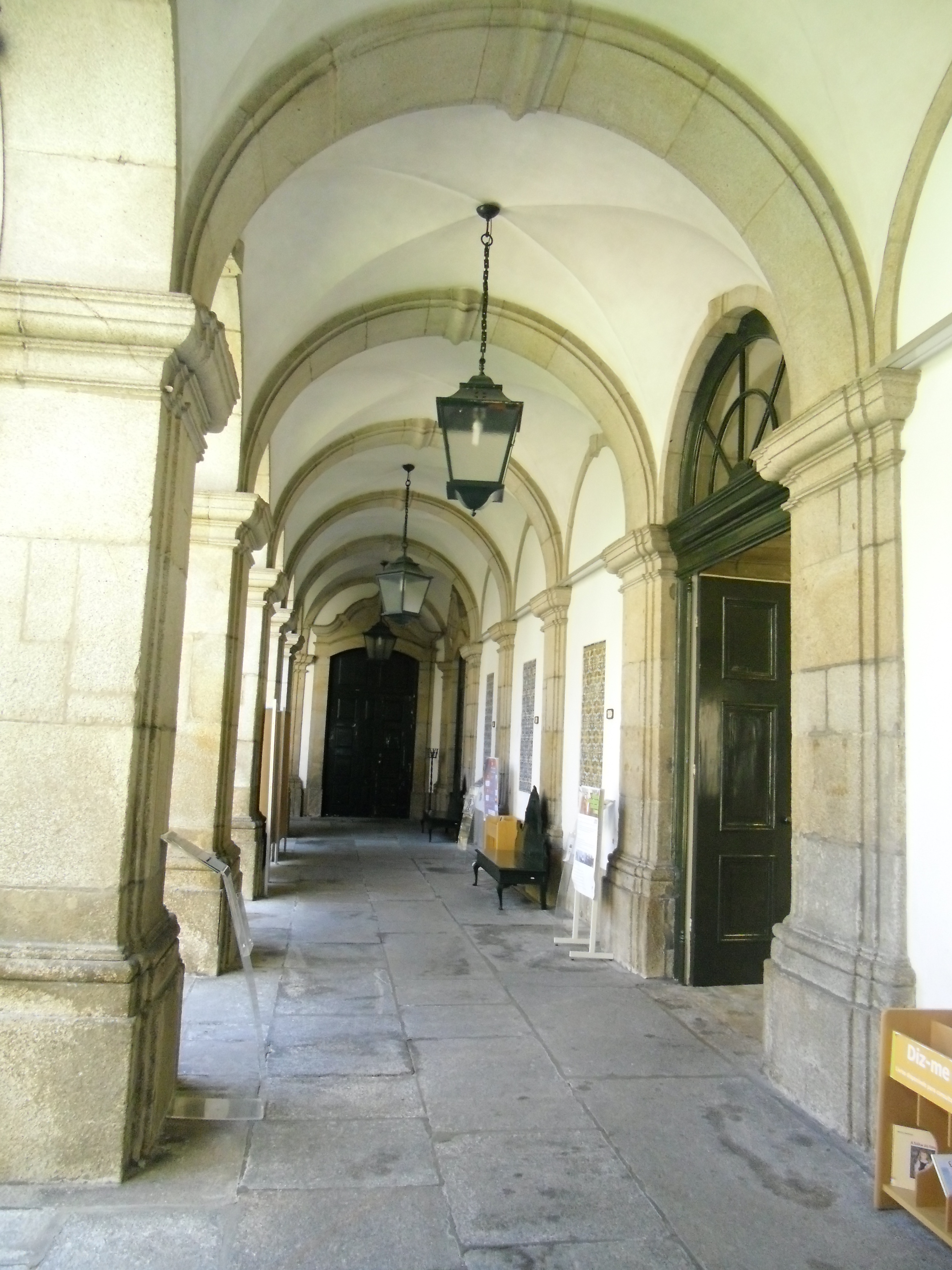 Claustros. Biblioteca publica municipal do Porto. Em Portuga, Porto, Porto, Santo Ildefonso This file was uploaded for Wiki Loves Monuments in Portugal with the unique identifier 73483.